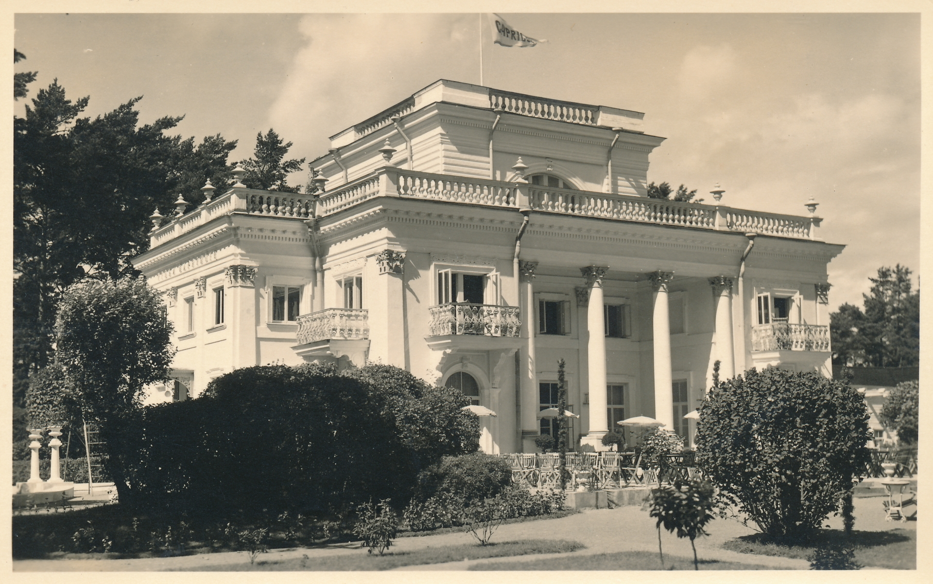 Villa Capriccio Narva-Jõesuus, valmis 1874. Hävis II maailmasõja ajal